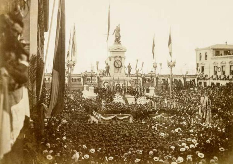 Imagenes de la plaza de la Intendencia, hoy Sotomayor, engalanada con ocasión de la llegada de los restos mortales de los héroes, 21 de mayo de 1888. Álbum “Monumento a la Marina”. Colección particular.